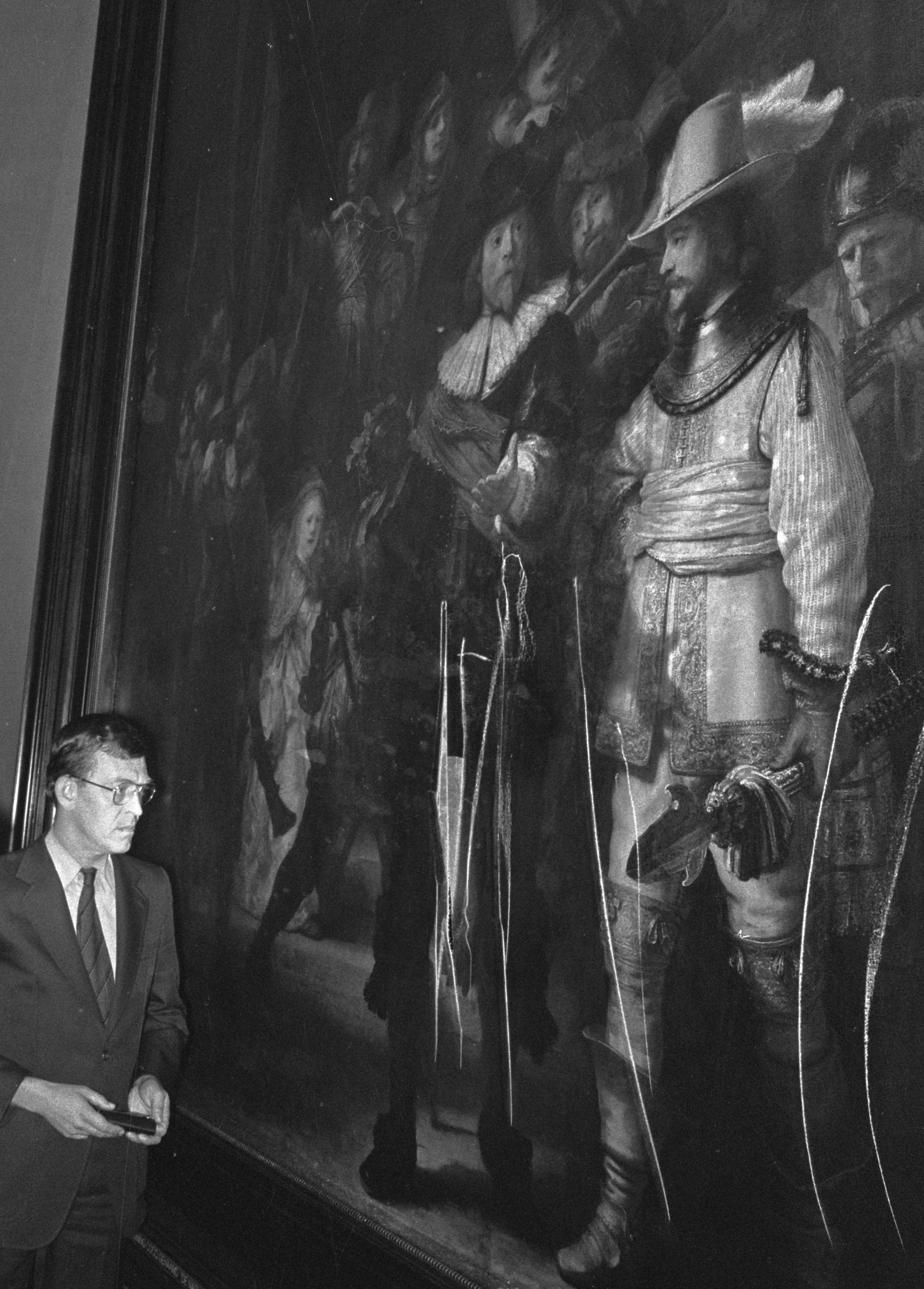 Nachtwacht van Rembrandt beschadigd; hoofd restauratie heer Kuiper